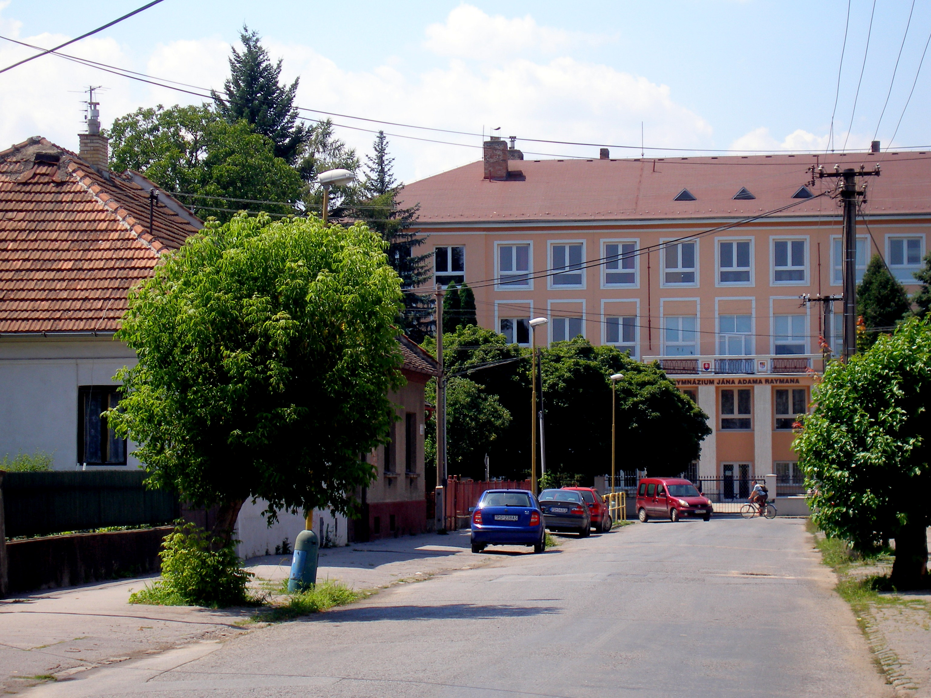 Ulica Mudroňova v Prešove.